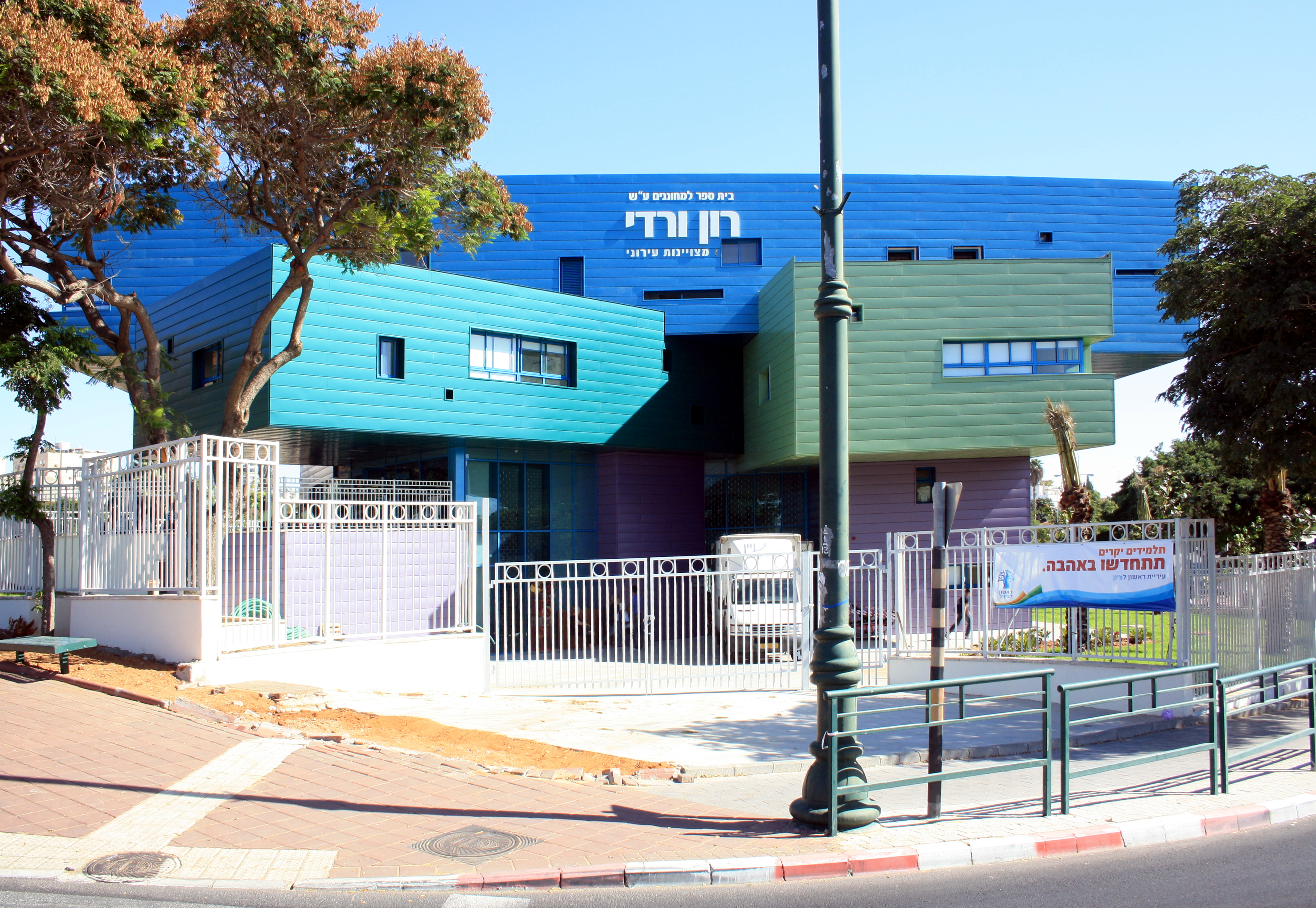 מרכז רון ורדי לטיפוח ילדים מחוננים